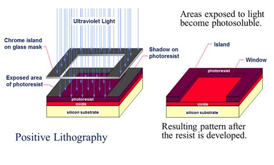 شکل 5- شماتیکی از فرایند EUVL با ماده مقاوم مثبت